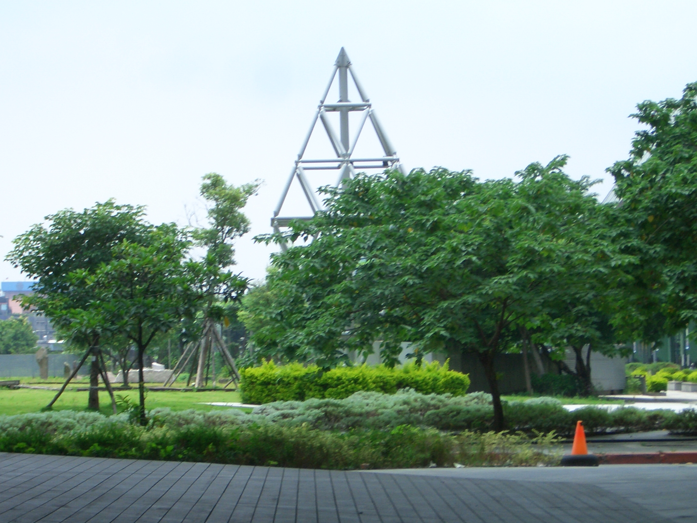 台北市中央藝文公園